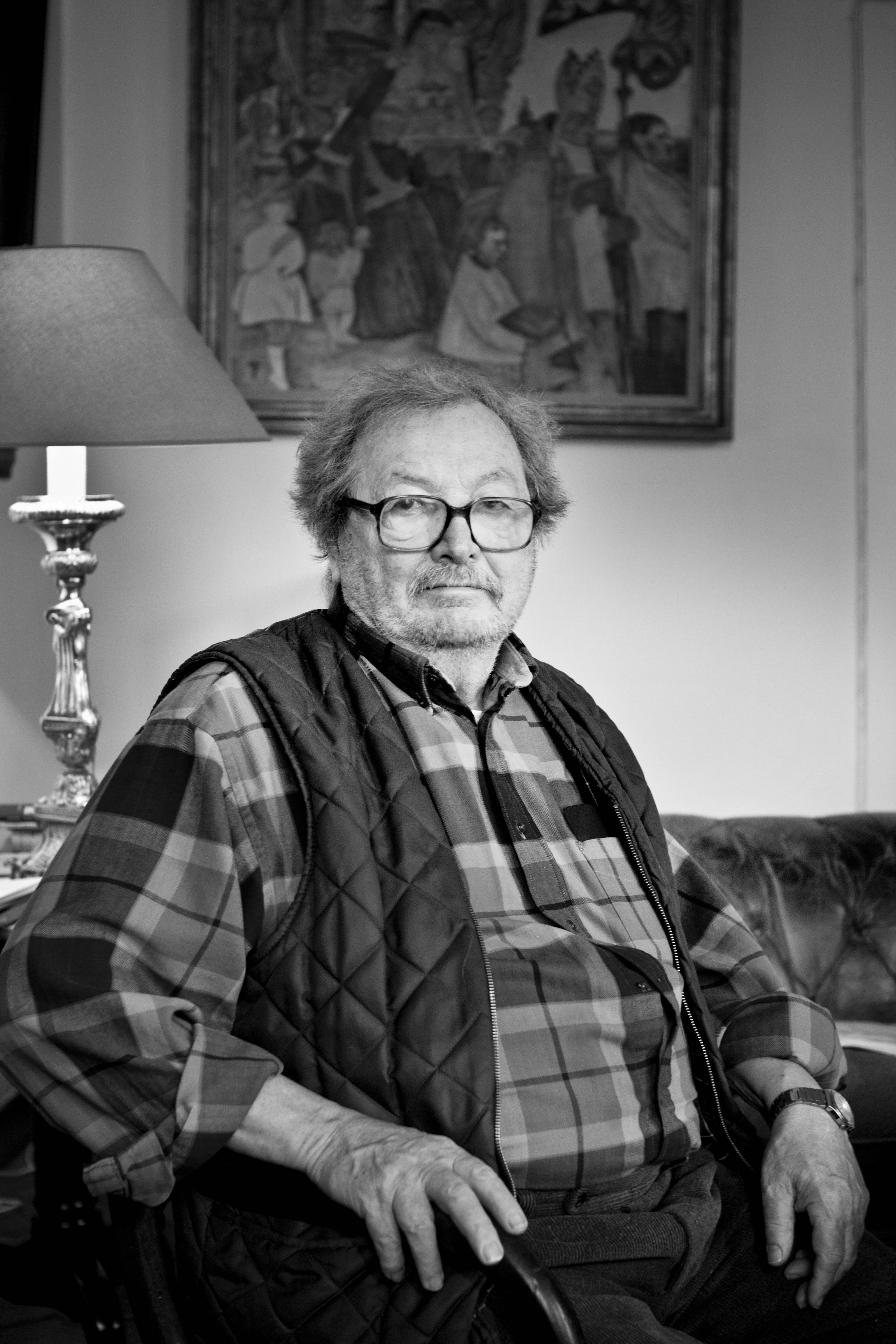 Gommaar Timmermans, beter bekend onder zijn pseudoniem GoT, Belgisch striptekenaar en auteur bij hem thuis in Lier.